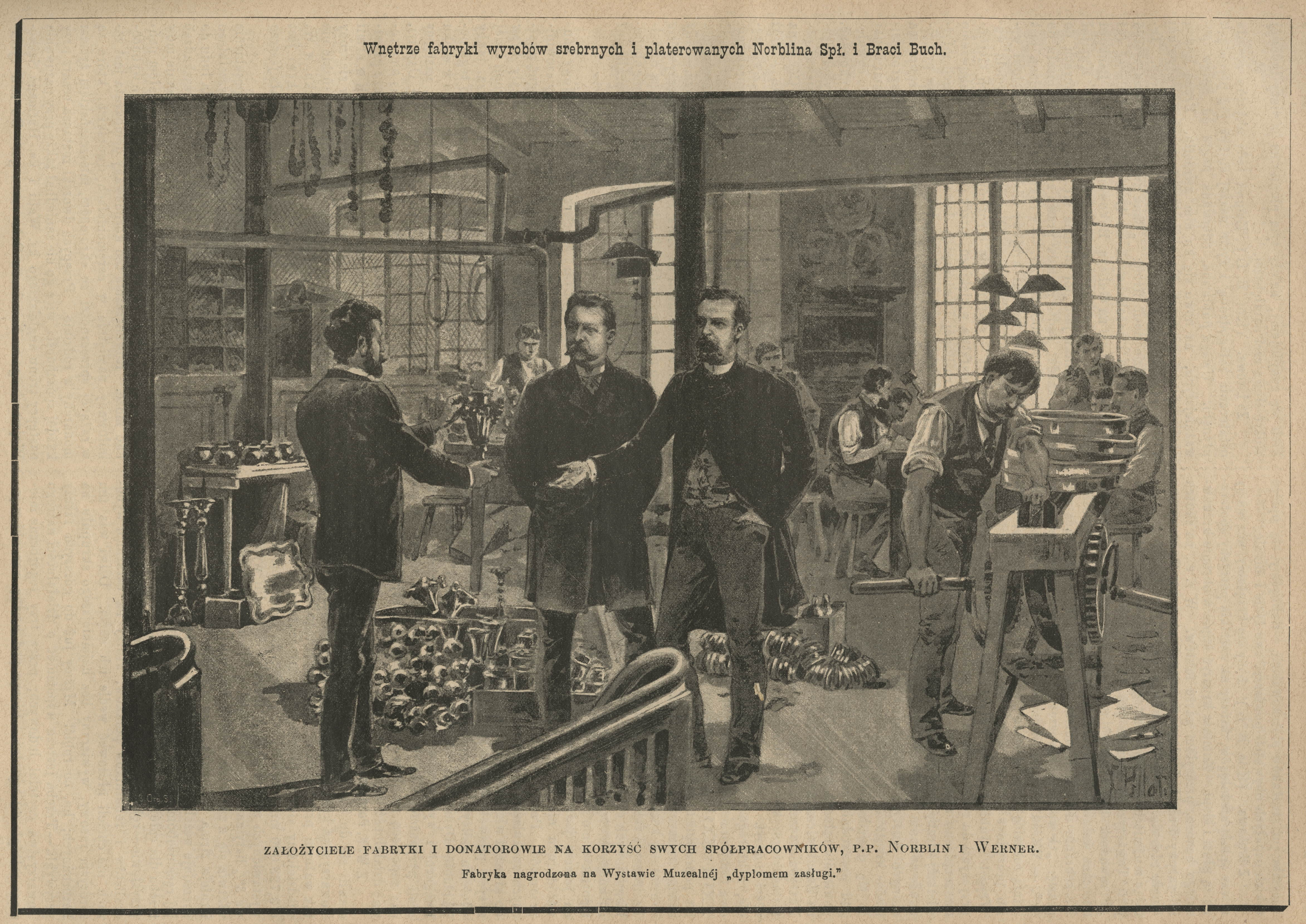 Wnętrze fabryki wyrobów srebrnych i platerowanych Norblina Spł. i Braci Buch.